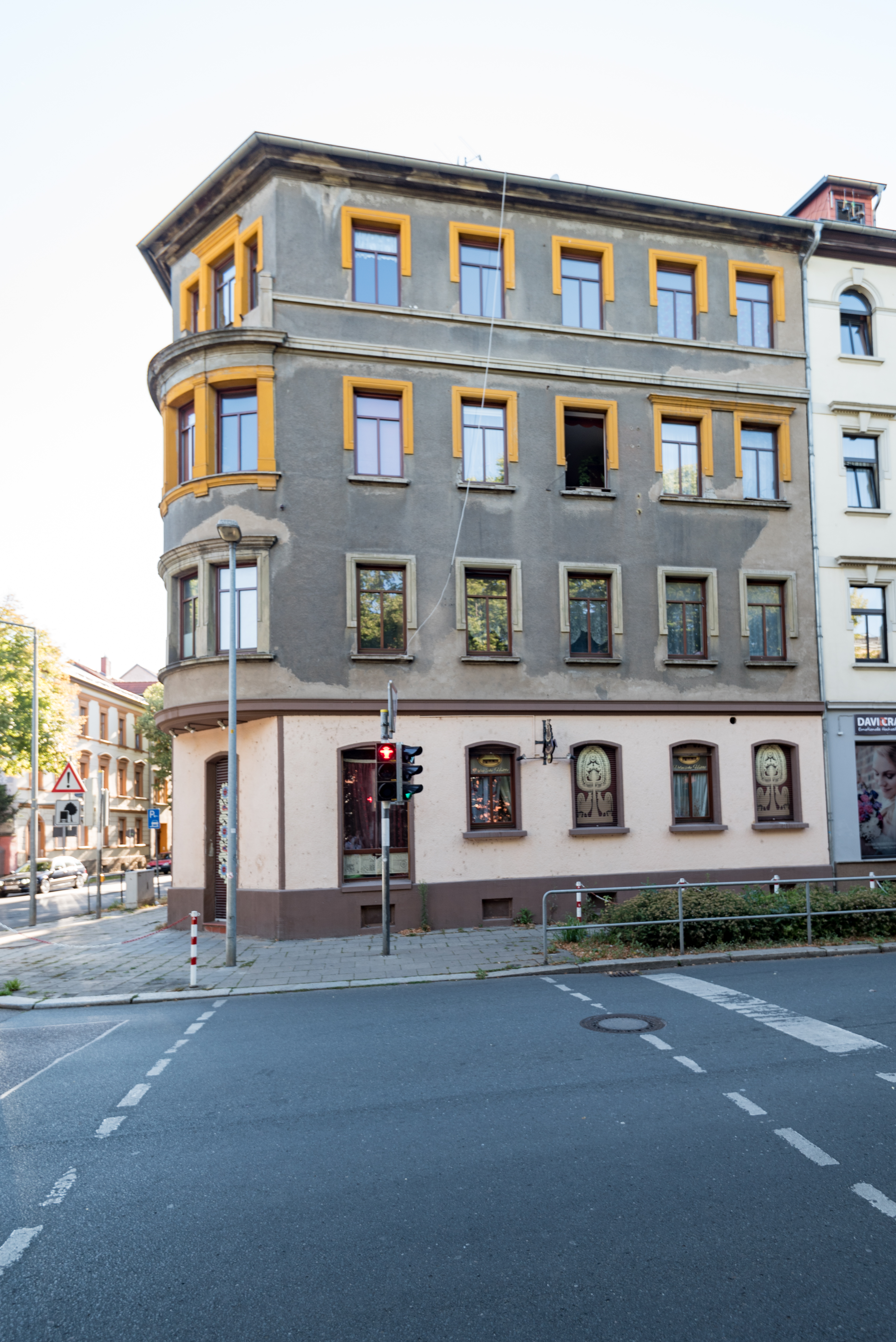 Weißenfels, Beuditzstraße 43